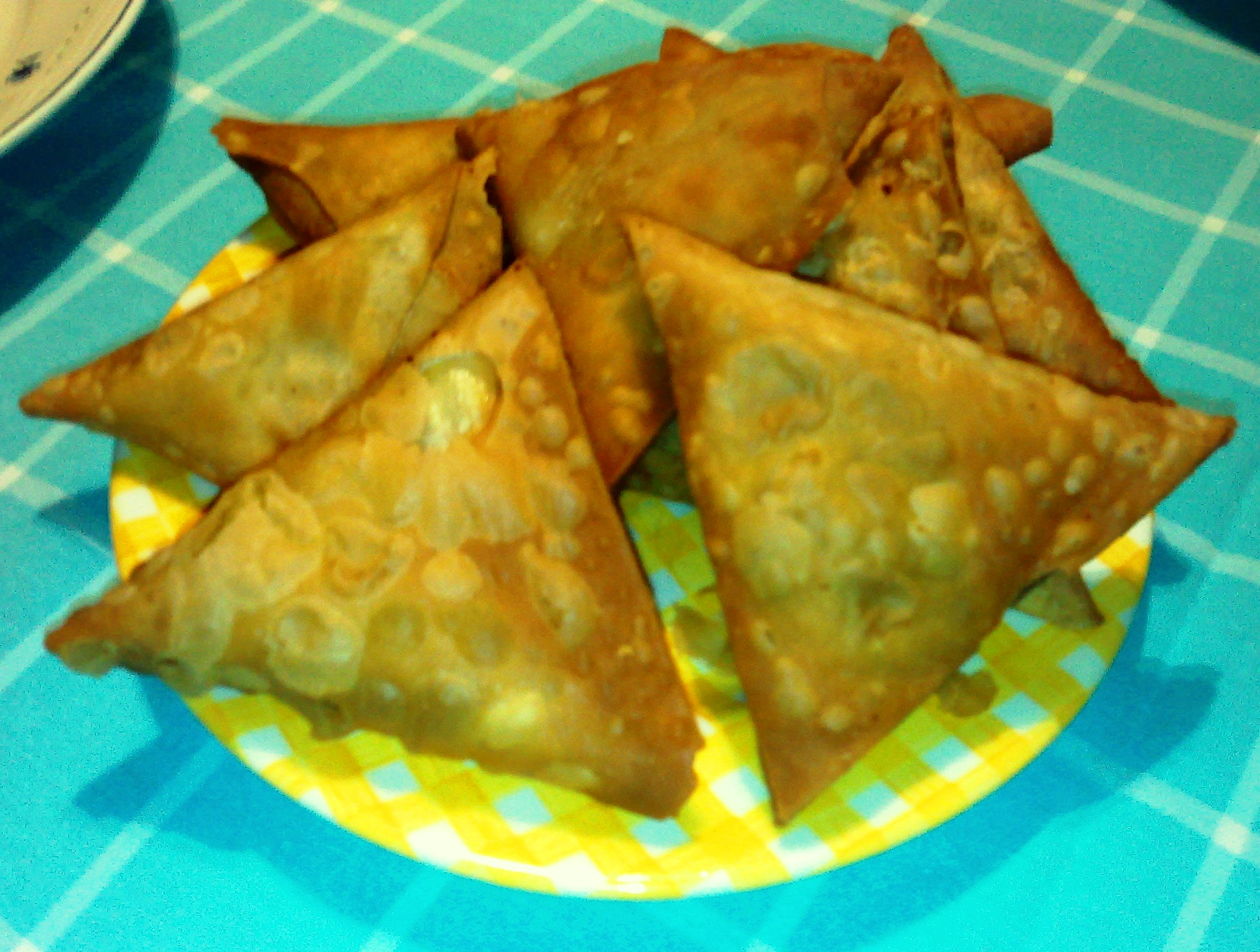 Chamuças de Goa. Chamuças (samosas) from Goa.